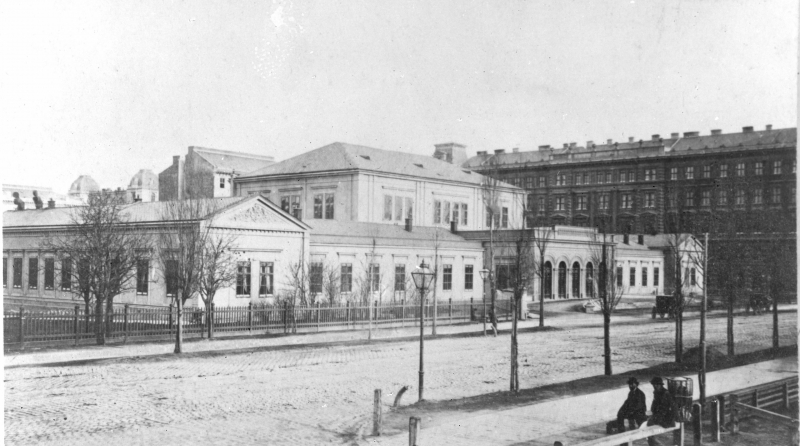 Altes Abgeordnetenhaus. Aufnahme von links. Währingerstraße, Wien 9.